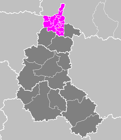 Maps of arrondissements and cantons of France: Arrondissement de Charleville-Mézières - Canton de Mézières-Est.PNG